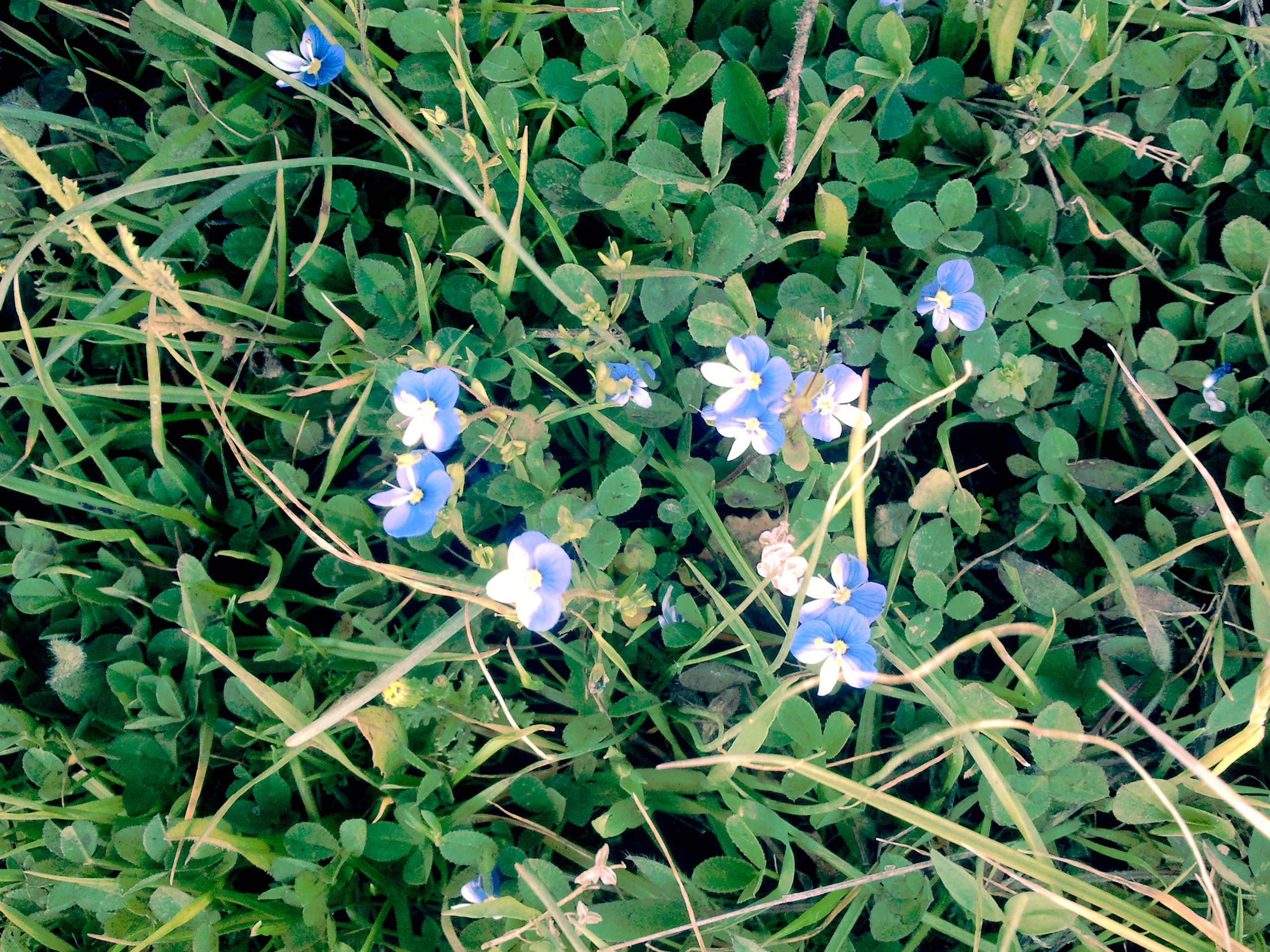 ברוניקה סורית היא צמח חד-שנתי ממשפחת הלחכיים צולם בנחל דליות ברמת הגולן